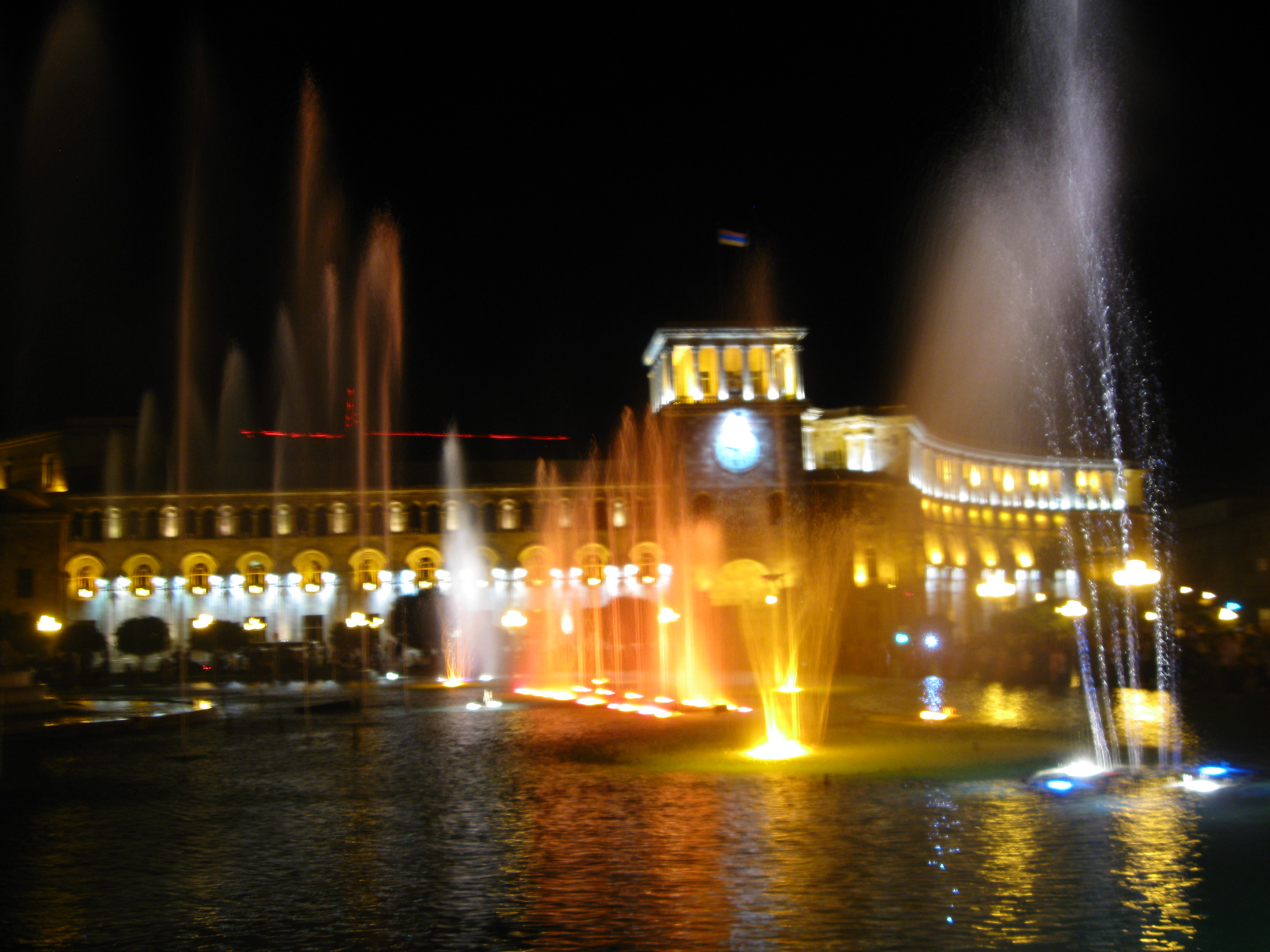 Musical fountain at night